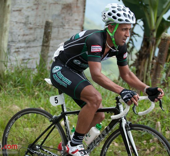 Alejandro Ramírez, ciclista del equipo colombiano Gobernación de Antioquia